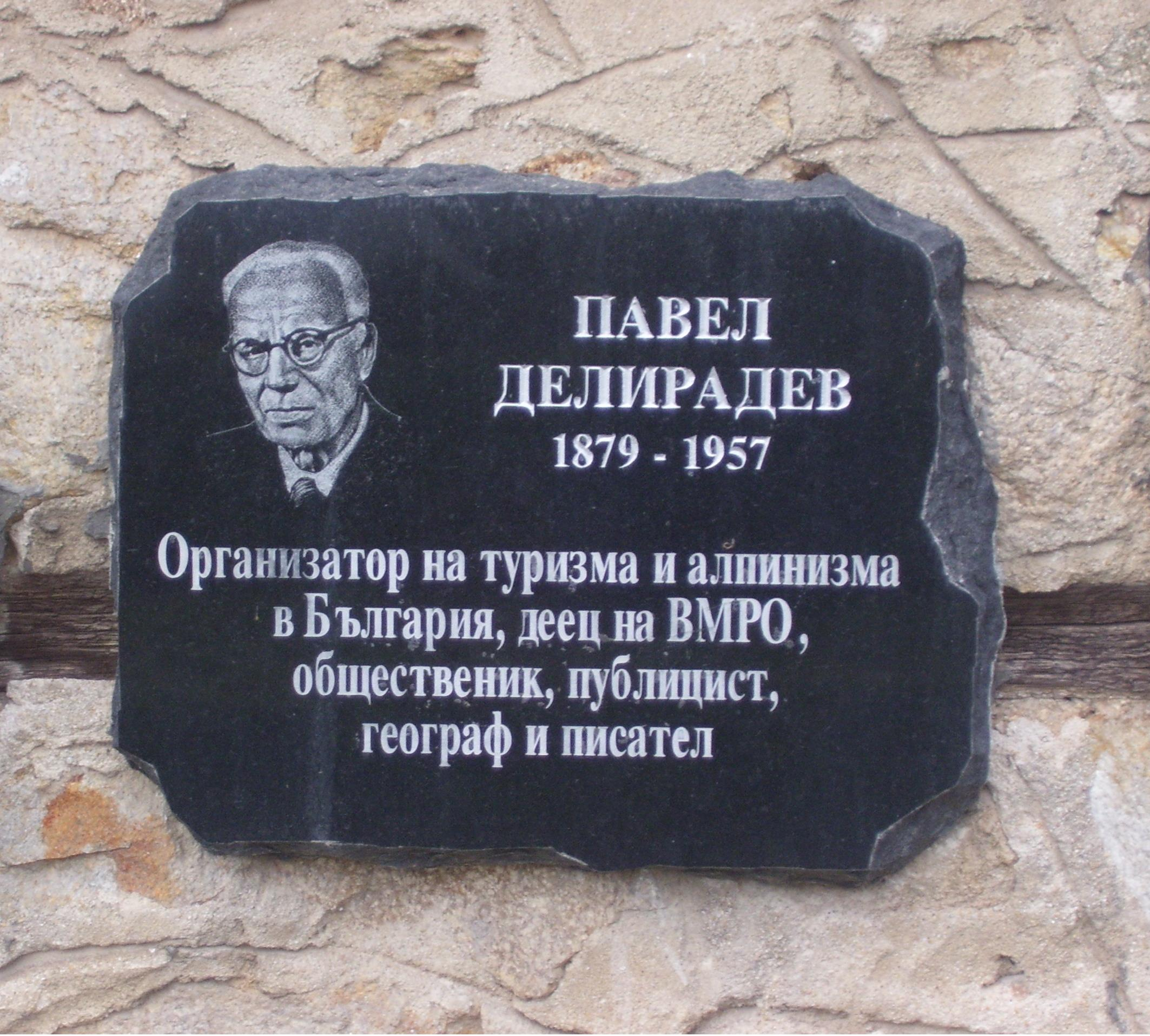 Паметна плоча на Павел Делирадев в родното му Панагюрище.